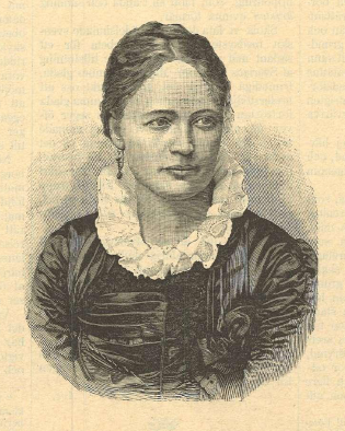 Concordia Löfving i Idun 1889.